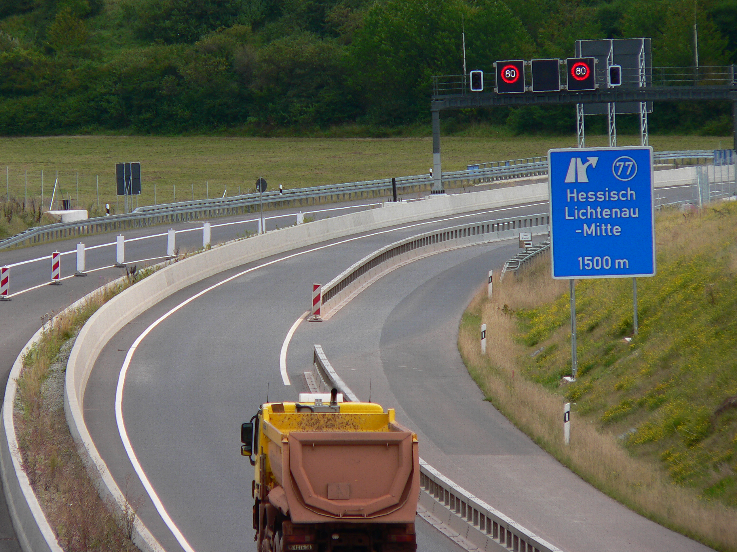 Bundesautobahn A44 bei Hessisch Lichtenau (vor dem Tunnel Schulberg), Hessen, Deutschland.